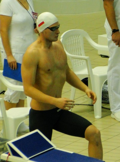 Dawid Szulich Zdjęcie wykonane podczas Grand Prix Polski w pływaniu, Kraków 2012.